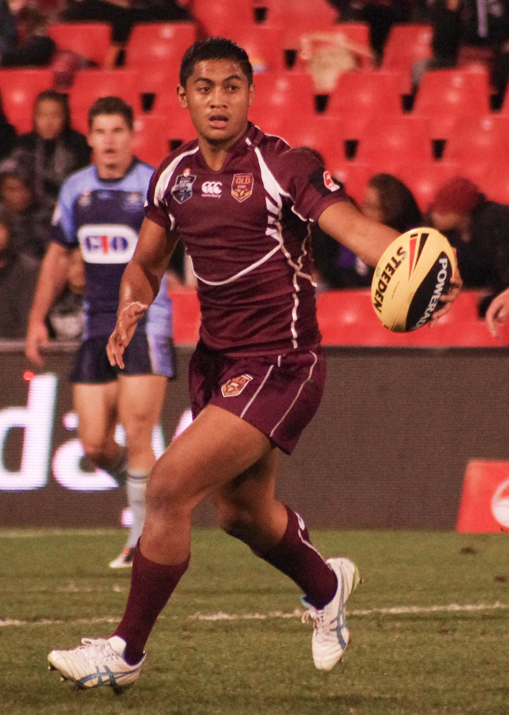 ANTHONY MILFORD